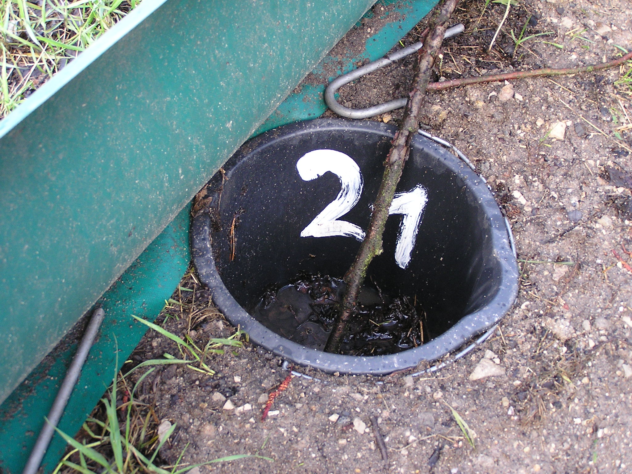 Sammeleimer am Krötenzaun entlang der Kurt-Schumacher-Straße zwischen Buckenhofer Forst und NSG Exerzierplatz in Erlangen, Deutschland.